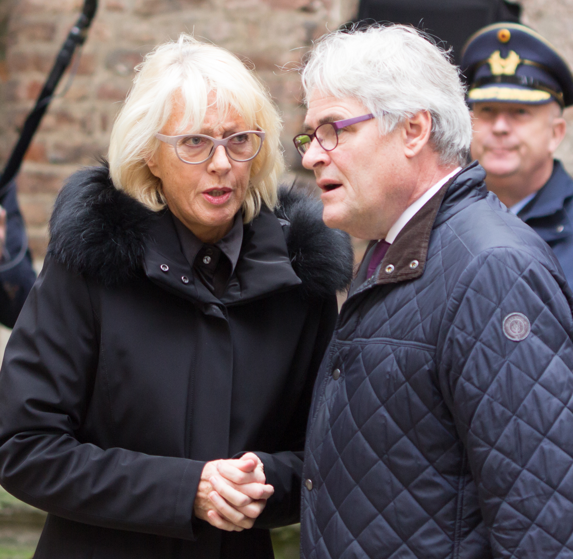 Volkstrauertag in Köln 2015, Alt St. Alban. Bürgermeisterin Elfi Scho-Antwerpes und Stadtdirektor Guido Kahlen im Gespräch